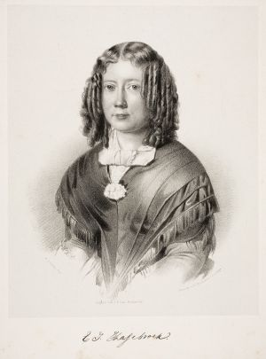 Elisabeth Hasebroek, 1811 - 1887, Nederlands schrijfster